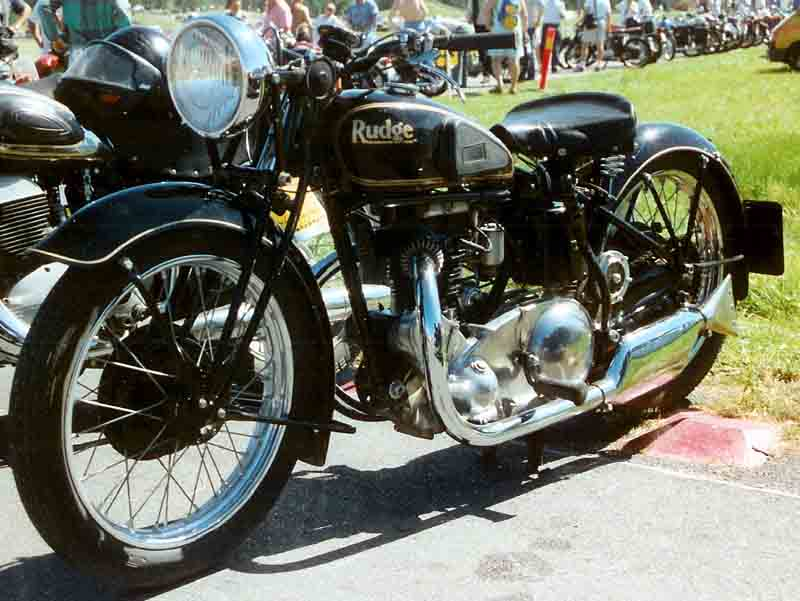 Rudge